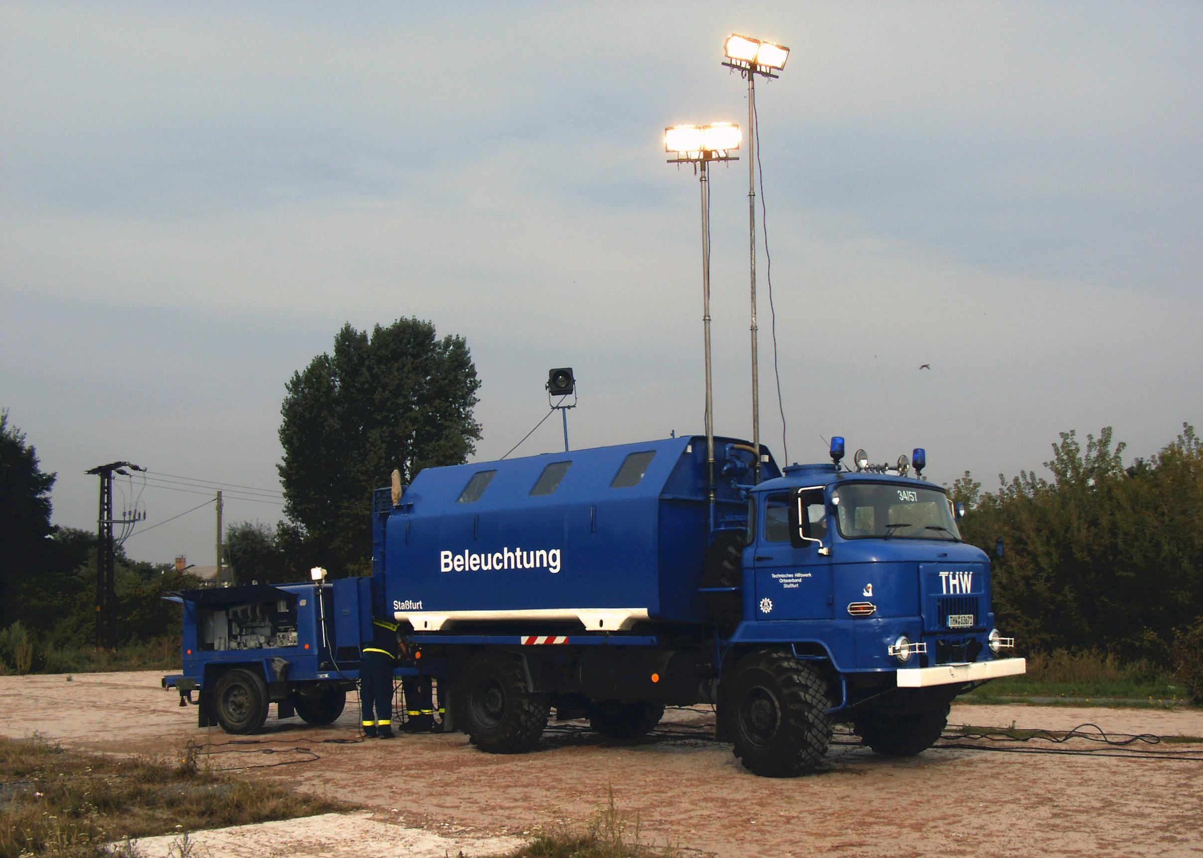 IFA L60 (THW)